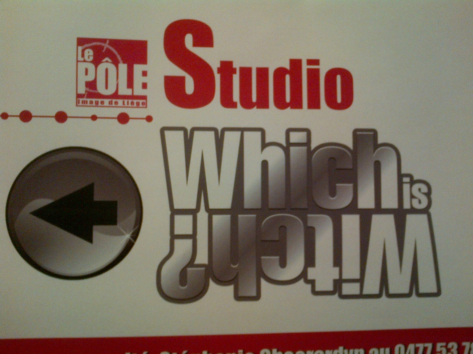 Stage Which Is Witch in Pole Image